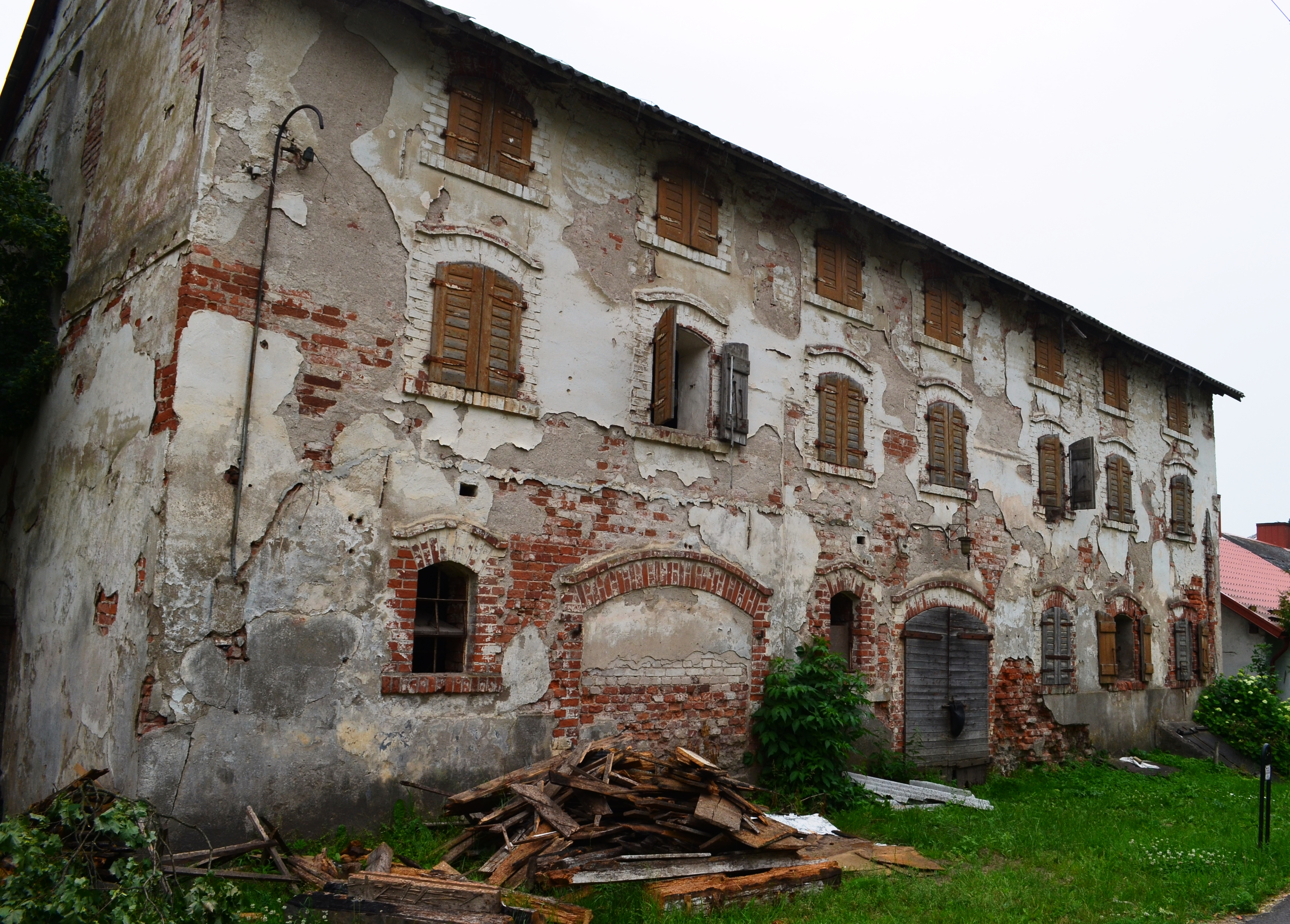 XIX a. svirnas, Vilkyškiai, Pagėgių sav.